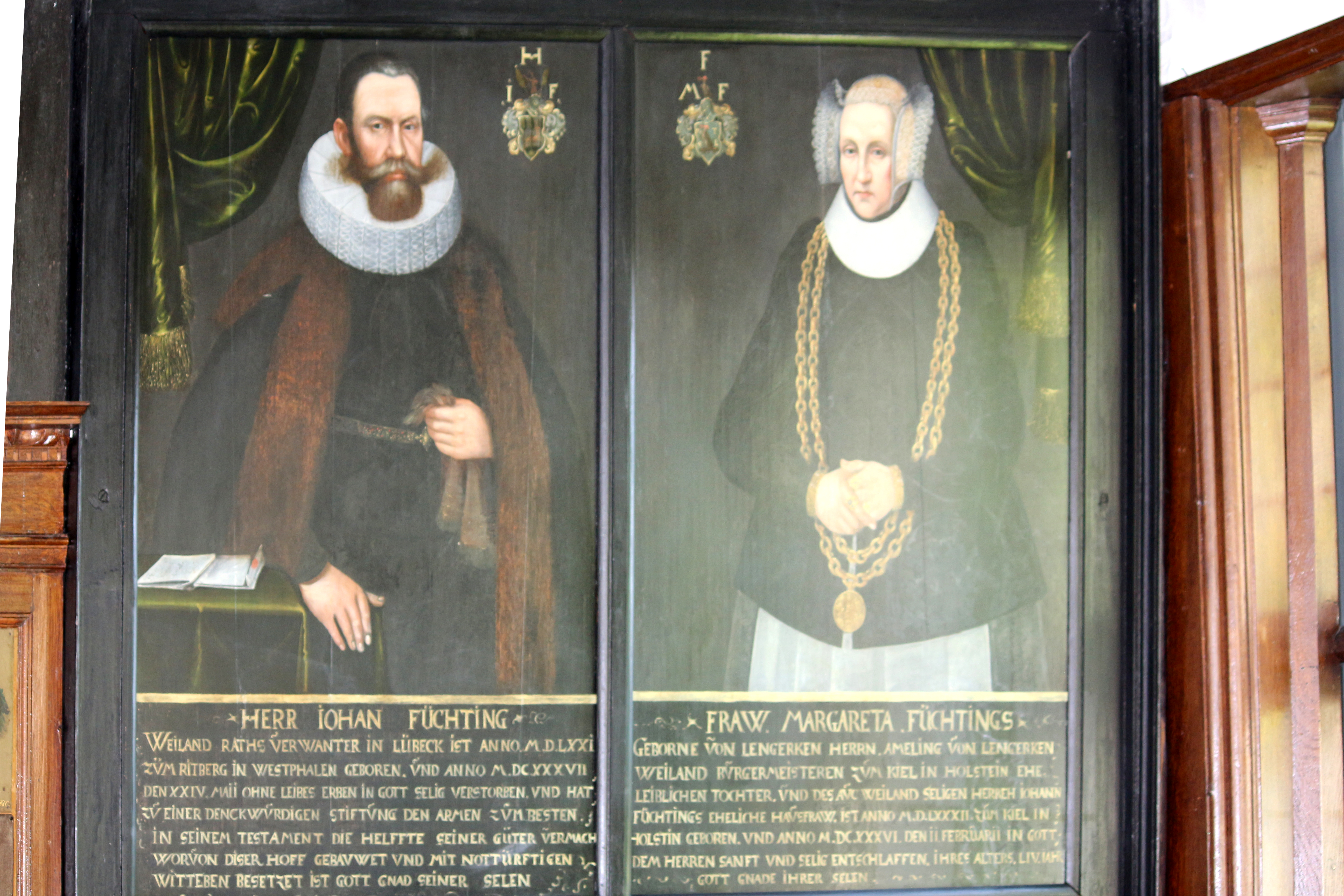 Gemälde des Ehepaars Füchting